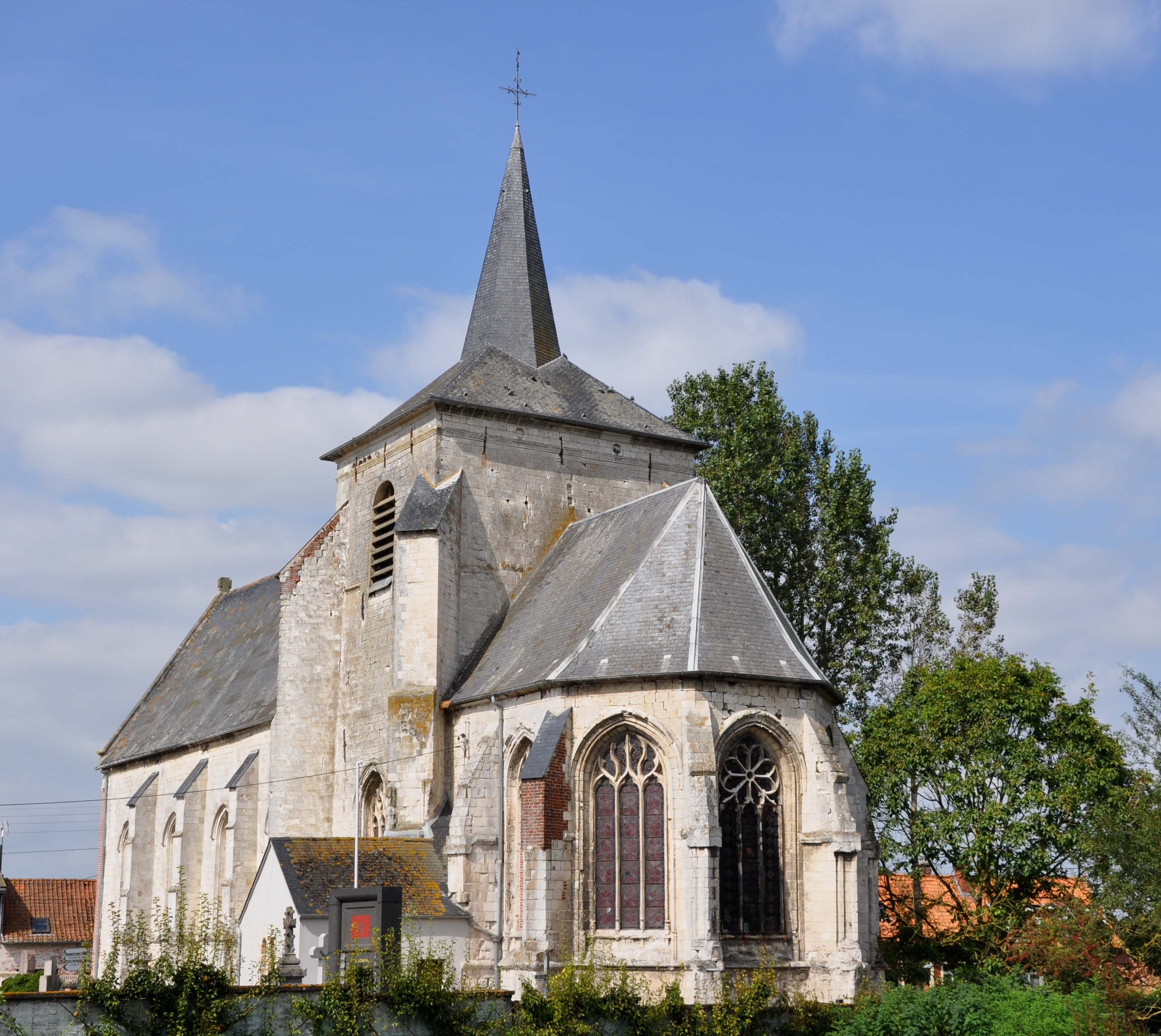 Église Sainte-Berthe de Febvin-Palfart, (Inscrit, 1926) .